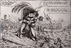 Императорские объятия на плоту (Встреча в Тильзите). Английская карикатура неизвестного художника 1800-е годов.